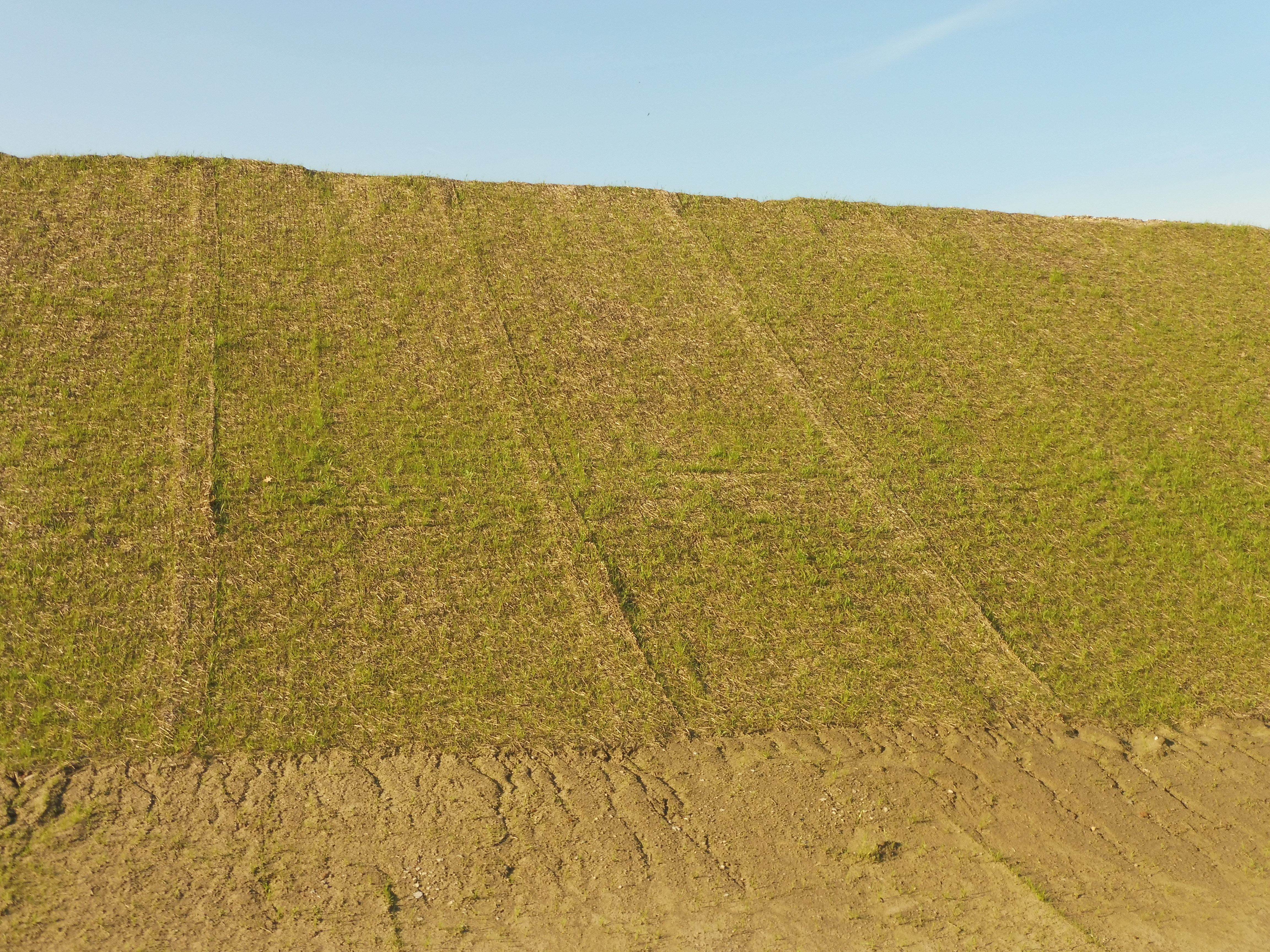 Böschungsmatten zur Erdsicherung eines neu aufgeschütteten Brückendamms für die Ortsumgehung der Bundesstraße 191 in Plau am See.